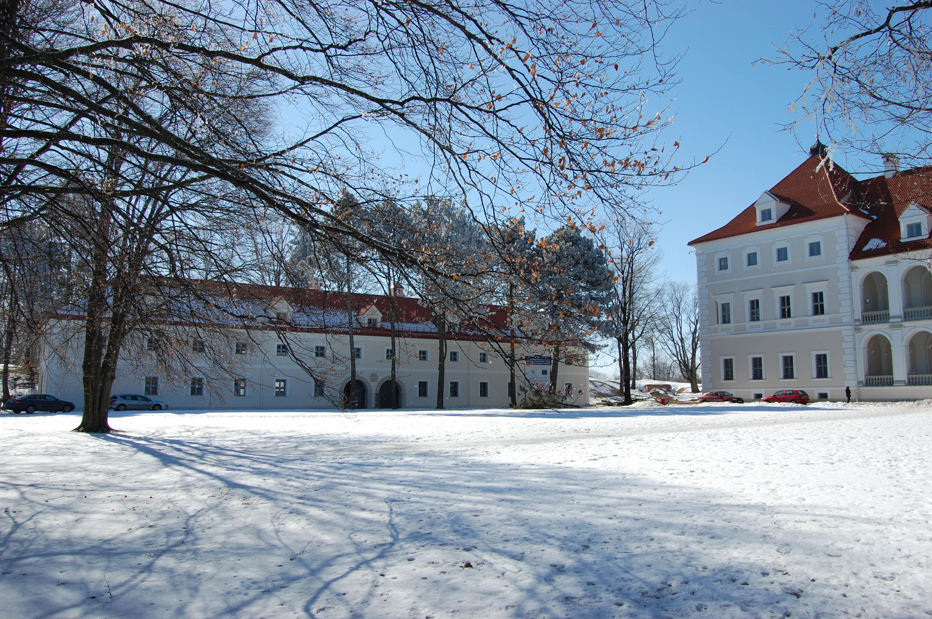 Biržų pilis žiema.